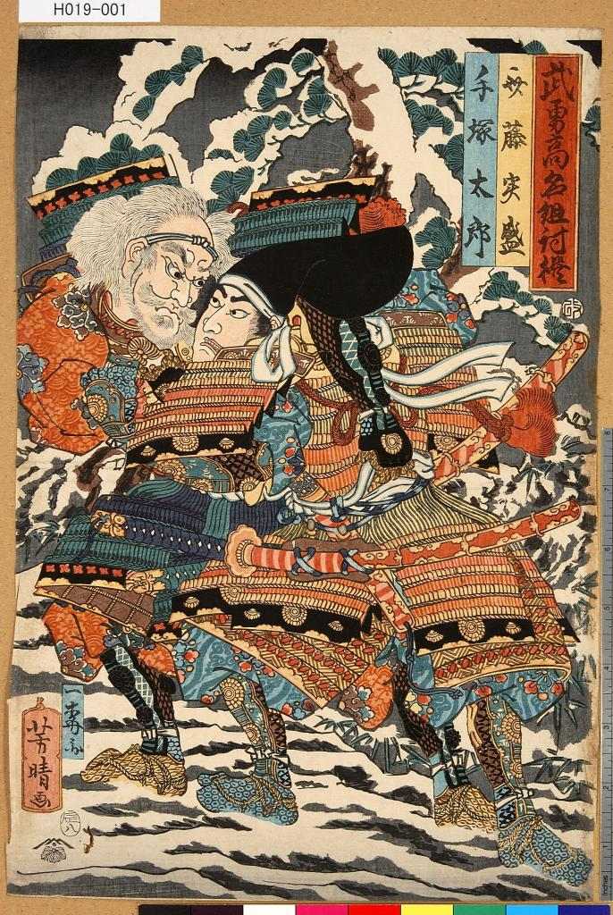 源平盛衰記 巻第三十 武者絵